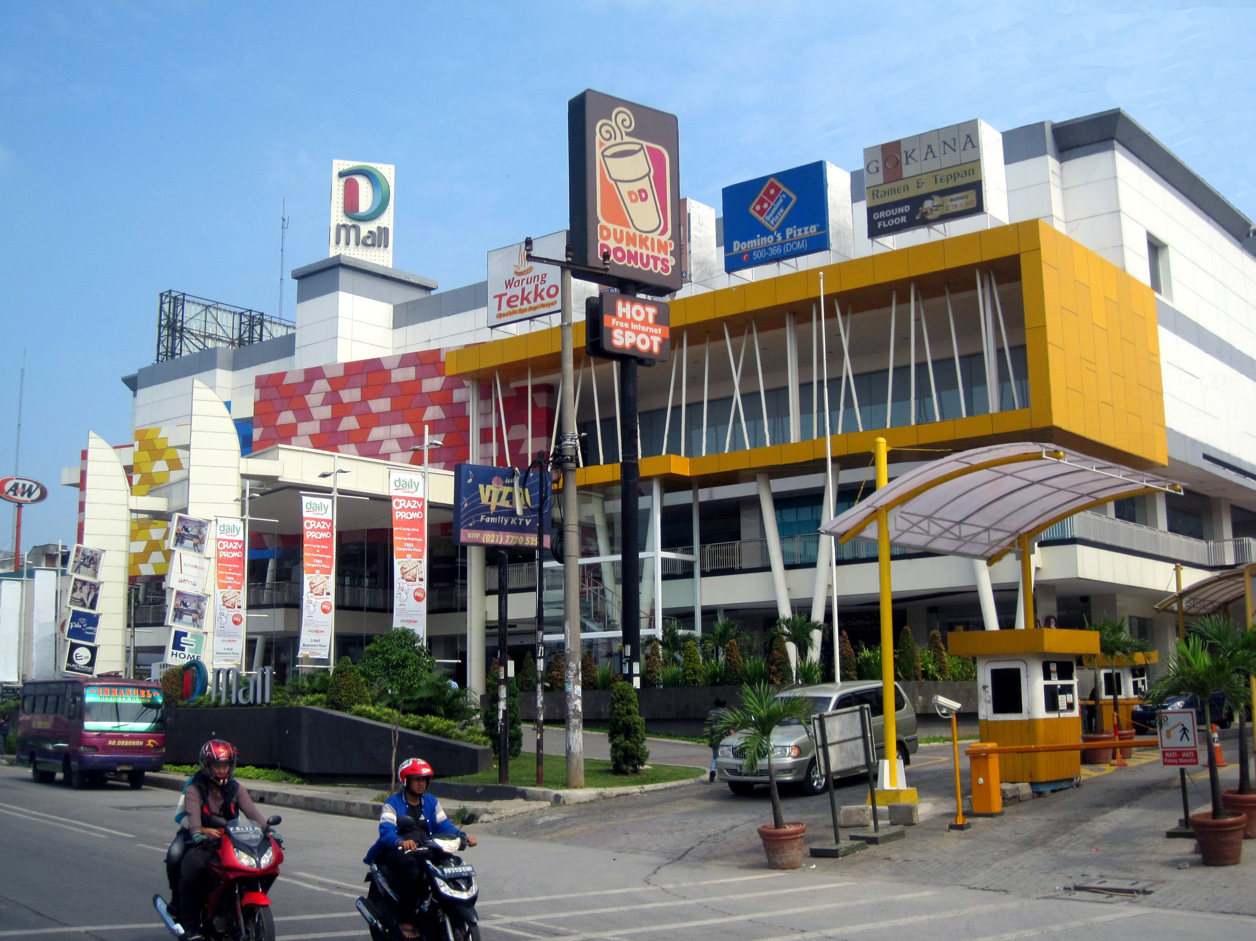 dmall_depok